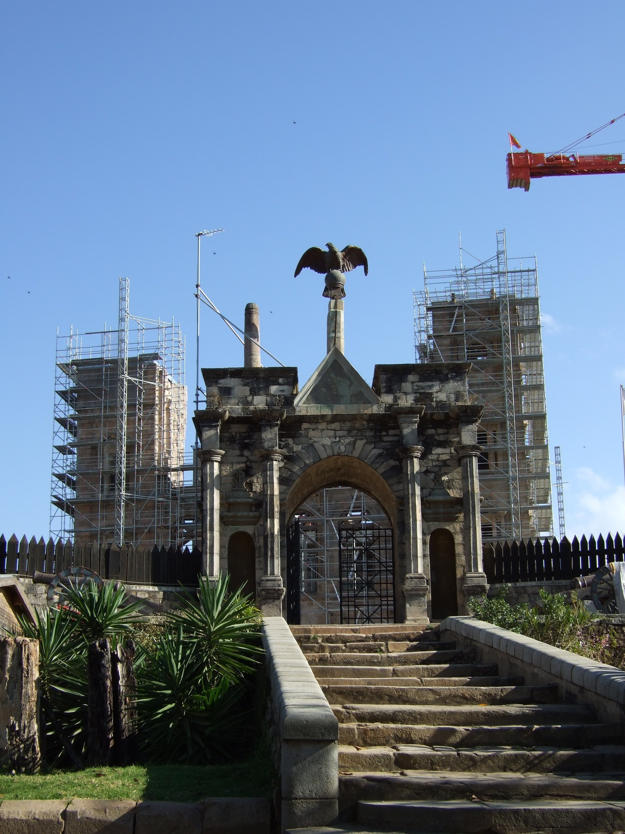 Rova Antananarivo Madagascar (former Queens Palace in restoration)